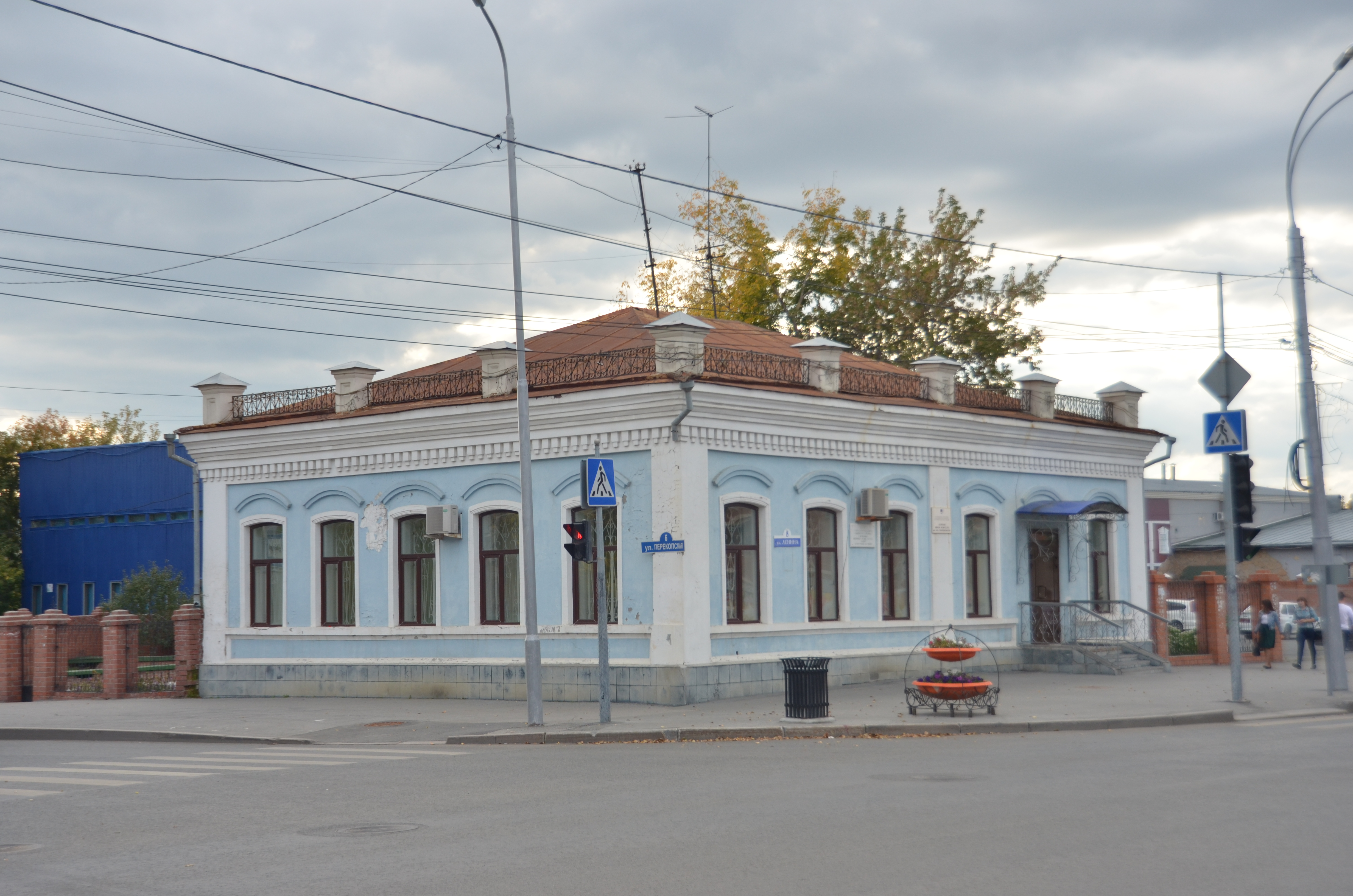 Магазин С.И. Иванова: улица Ленина, 8, Тюмень, Тюменская область